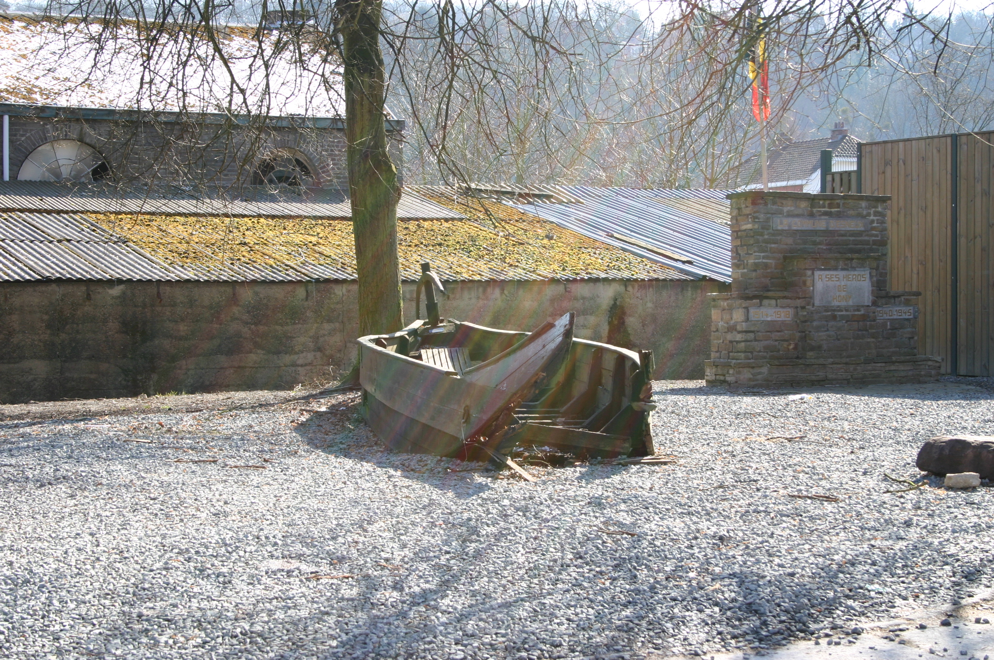 Eng Betchette dei iwerlieft huet.